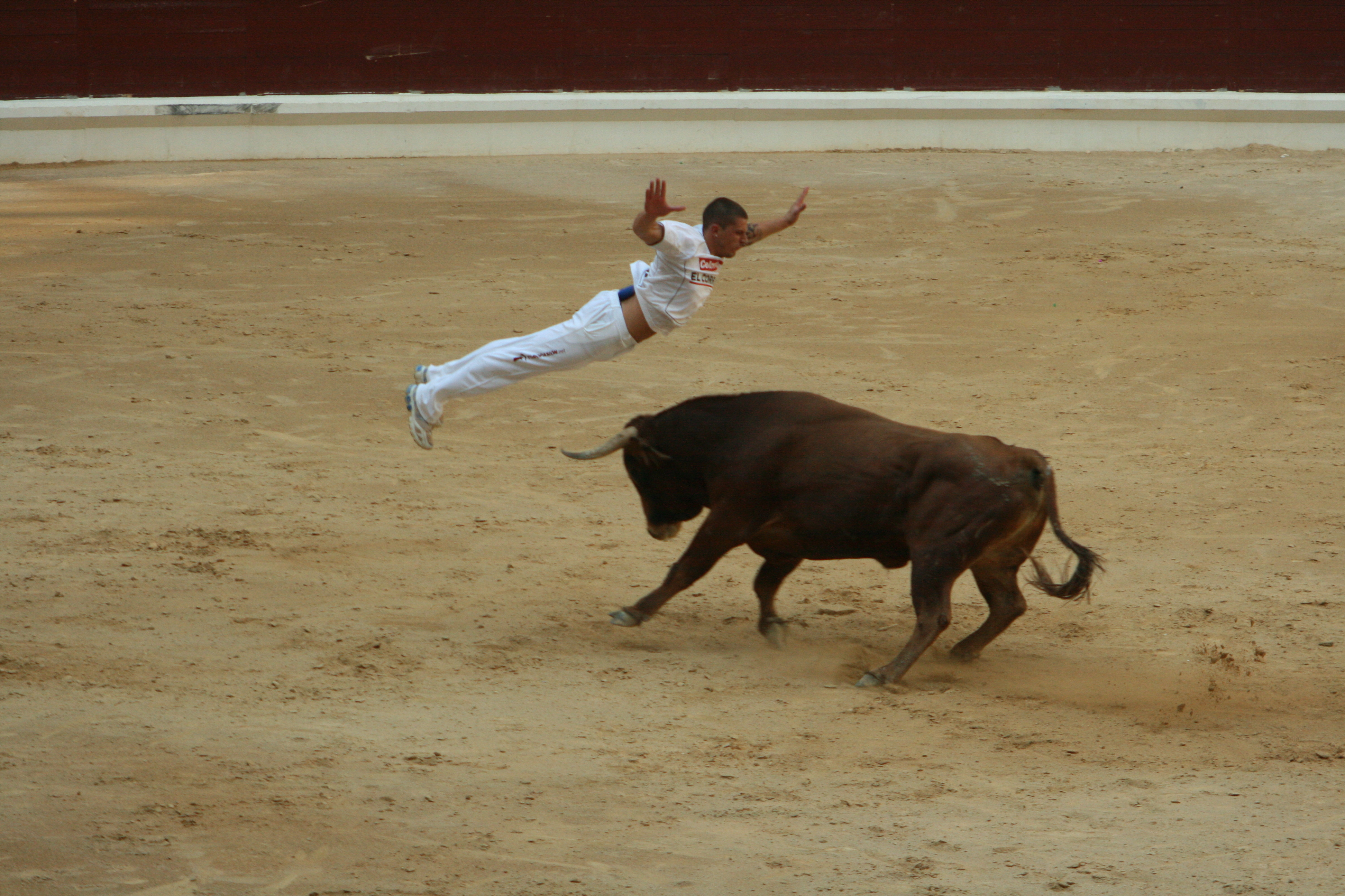 Un recortador realiza un salto sobre un toro.